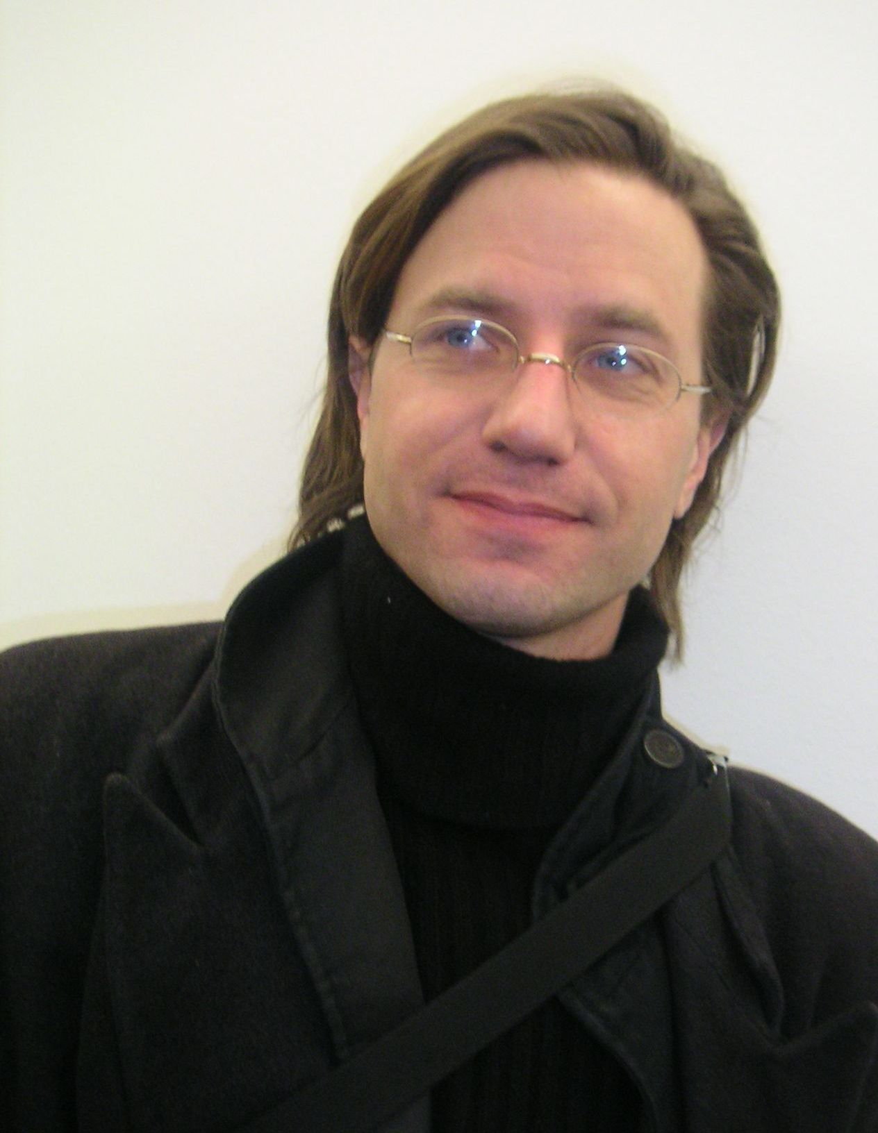 Writer and Translator Stefan Zweifel 2004 in Zürich. Autor und Übersetzer Stefan Zweifel 2004 in Zürich.